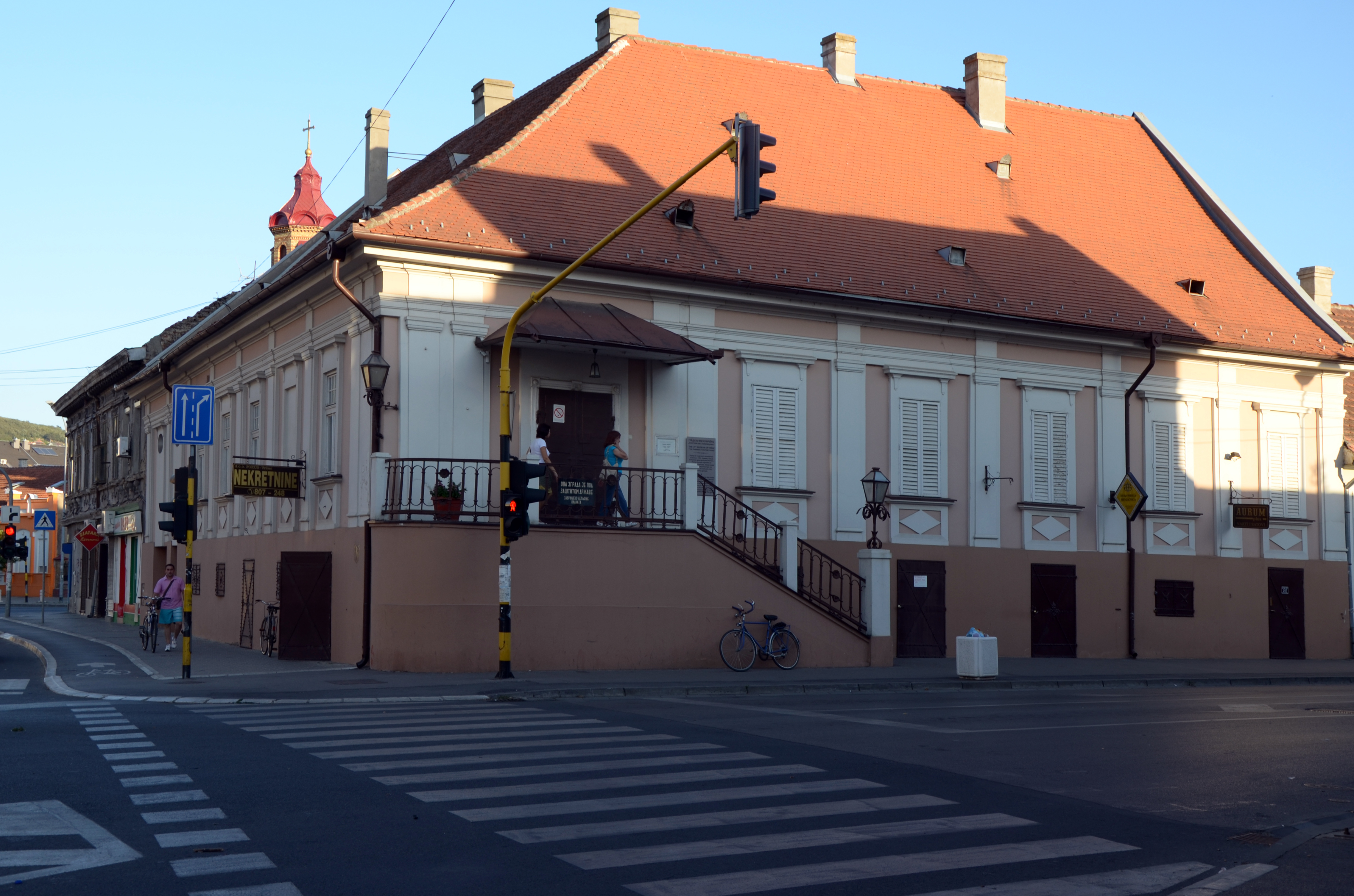 Зграда старе градске апотеке у Вршцу